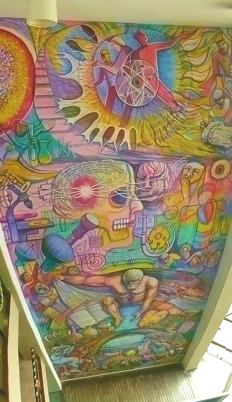 Mural de la Universidad Nacional Mayor de San Marcos ubicado en la sede de su Biblioteca Central (Lima, Perú).